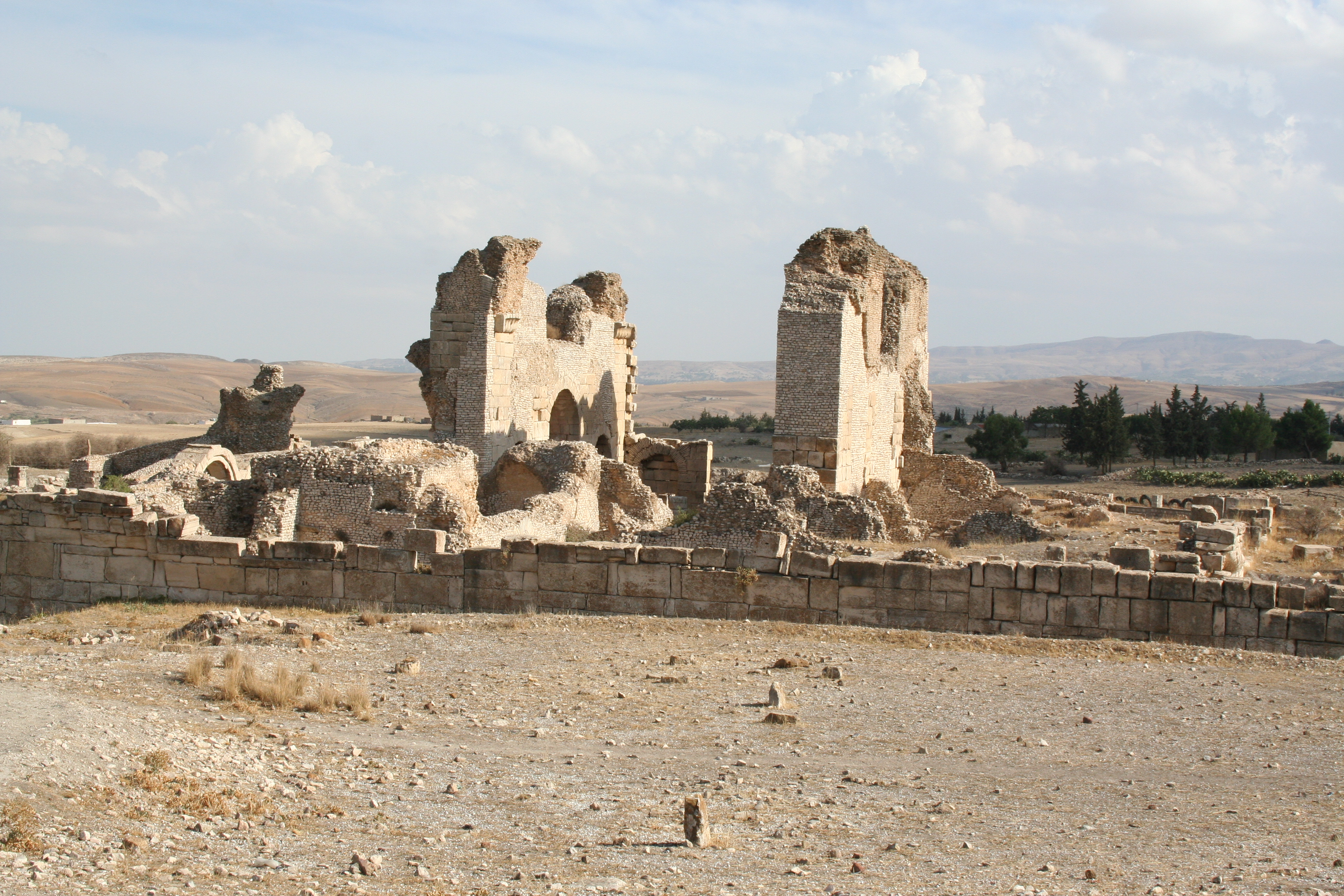 Grands thermes sud de Makthar